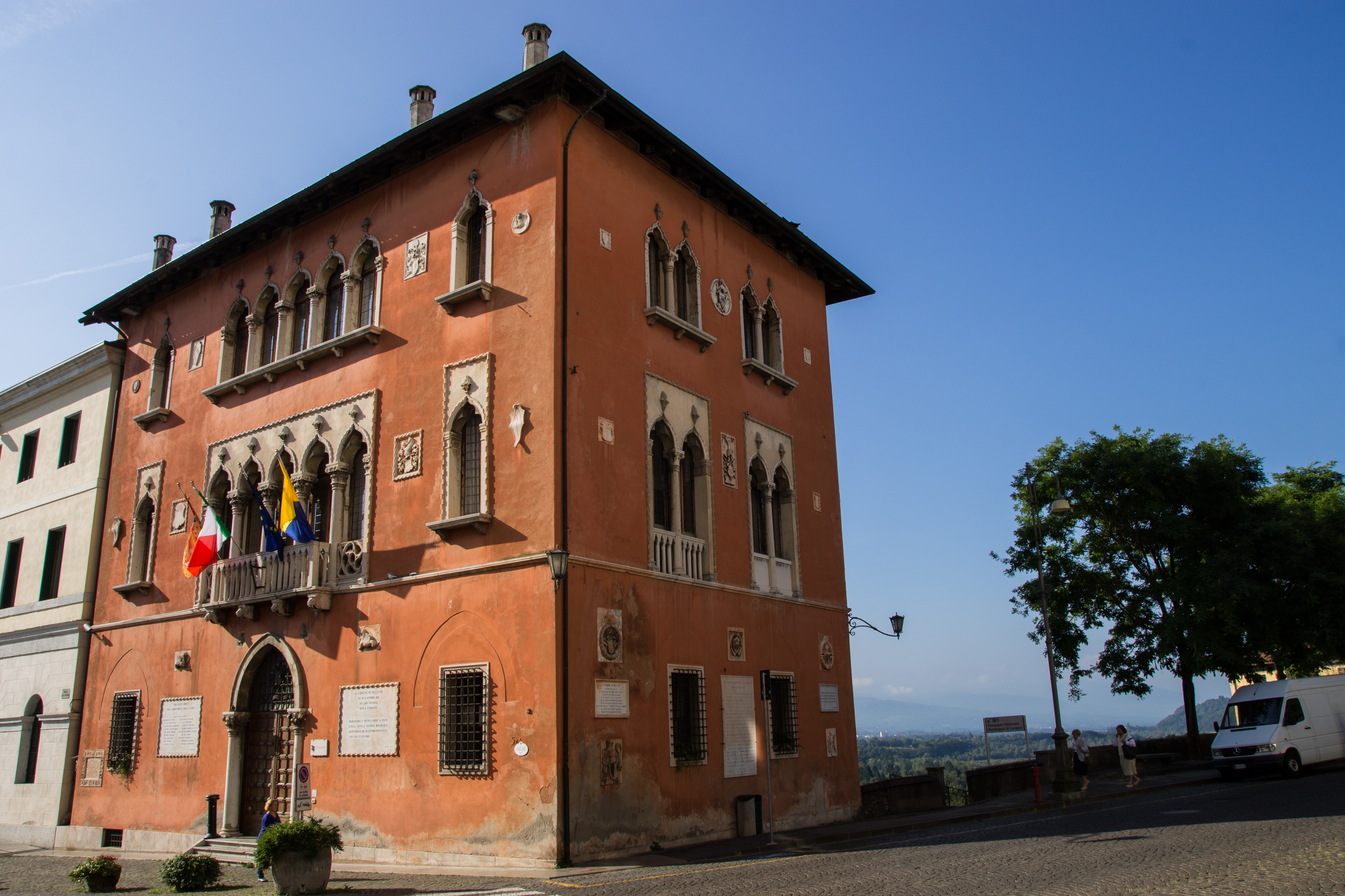 Palazzo Rosso 05A7570001 This is a photo of a monument which is part of cultural heritage of Italy.